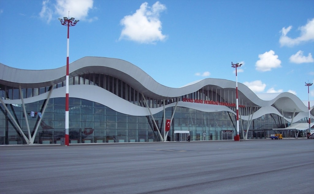 Yeni Terminal binası